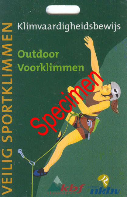 Front van KVB3-kaart